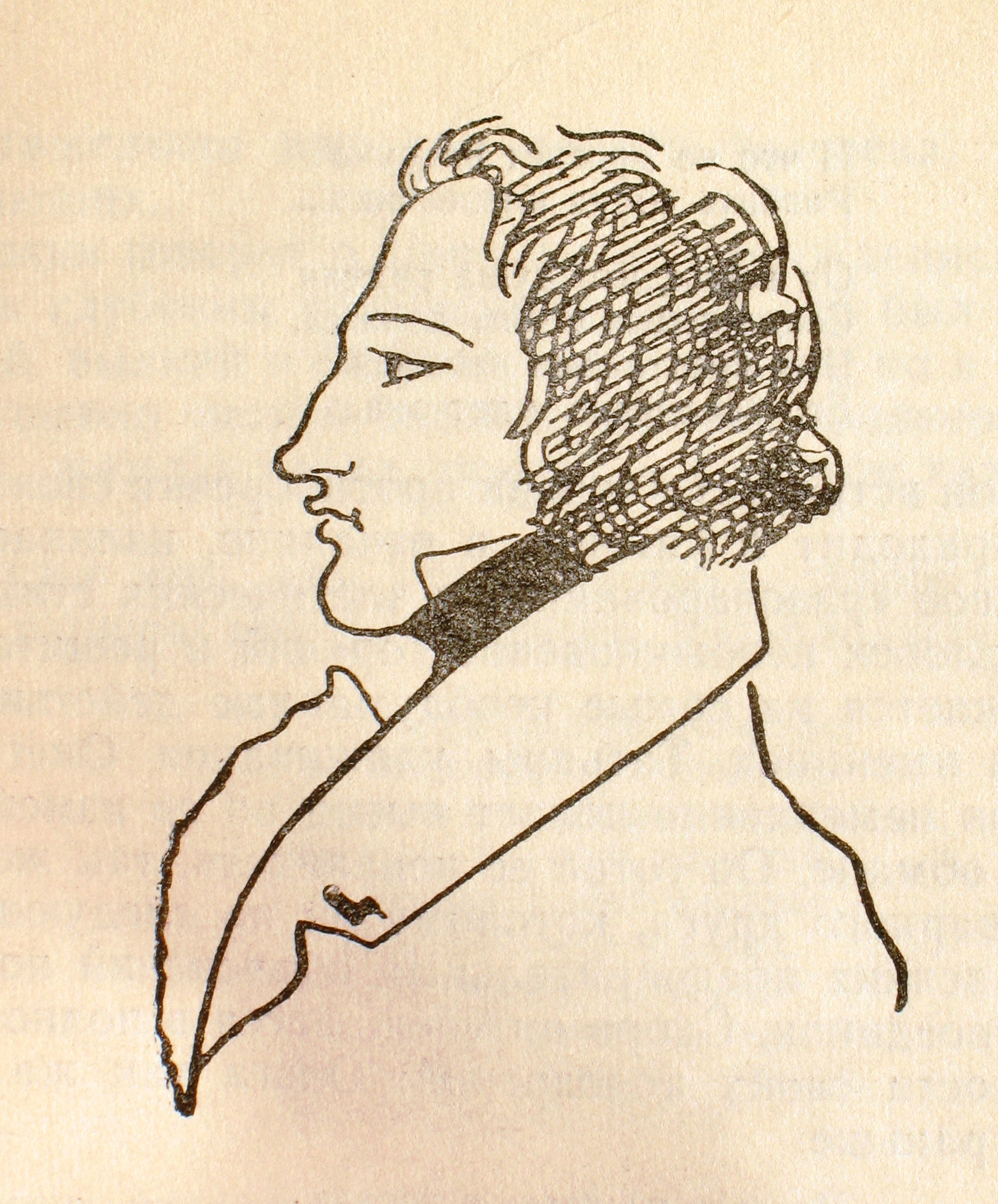 Рисунок А.С. Пушкина в рукописи "Евгения Онегина". По устаревшей атрибуции С. А. Венгерова - портрет Владимира Ленского. По современной атрибуции Т. Г. Цявловской - портрет В. И. Туманского, эпиграмма на которого набросана рядом